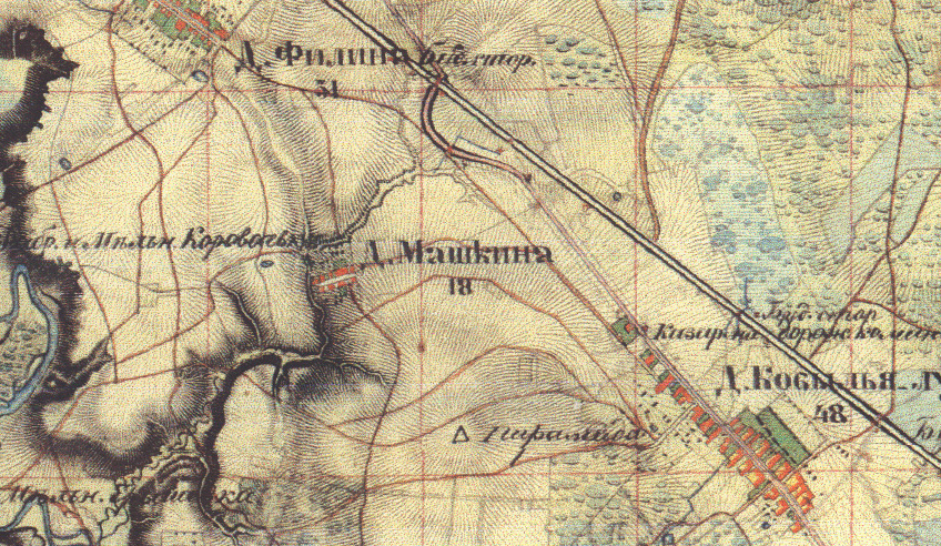 История московского района Куркино - деревня Машкино